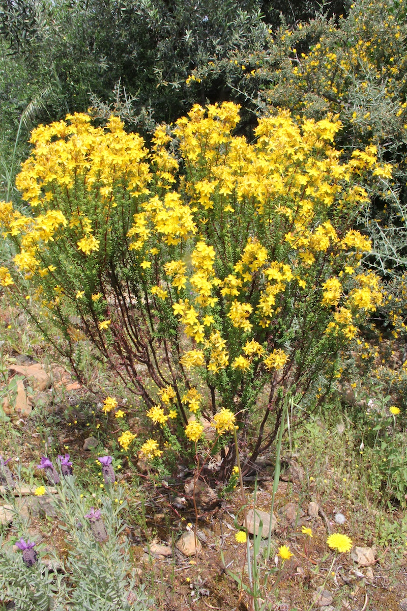 Hypericum empetrifolium subsp. empetrifolium, det User:RLJ